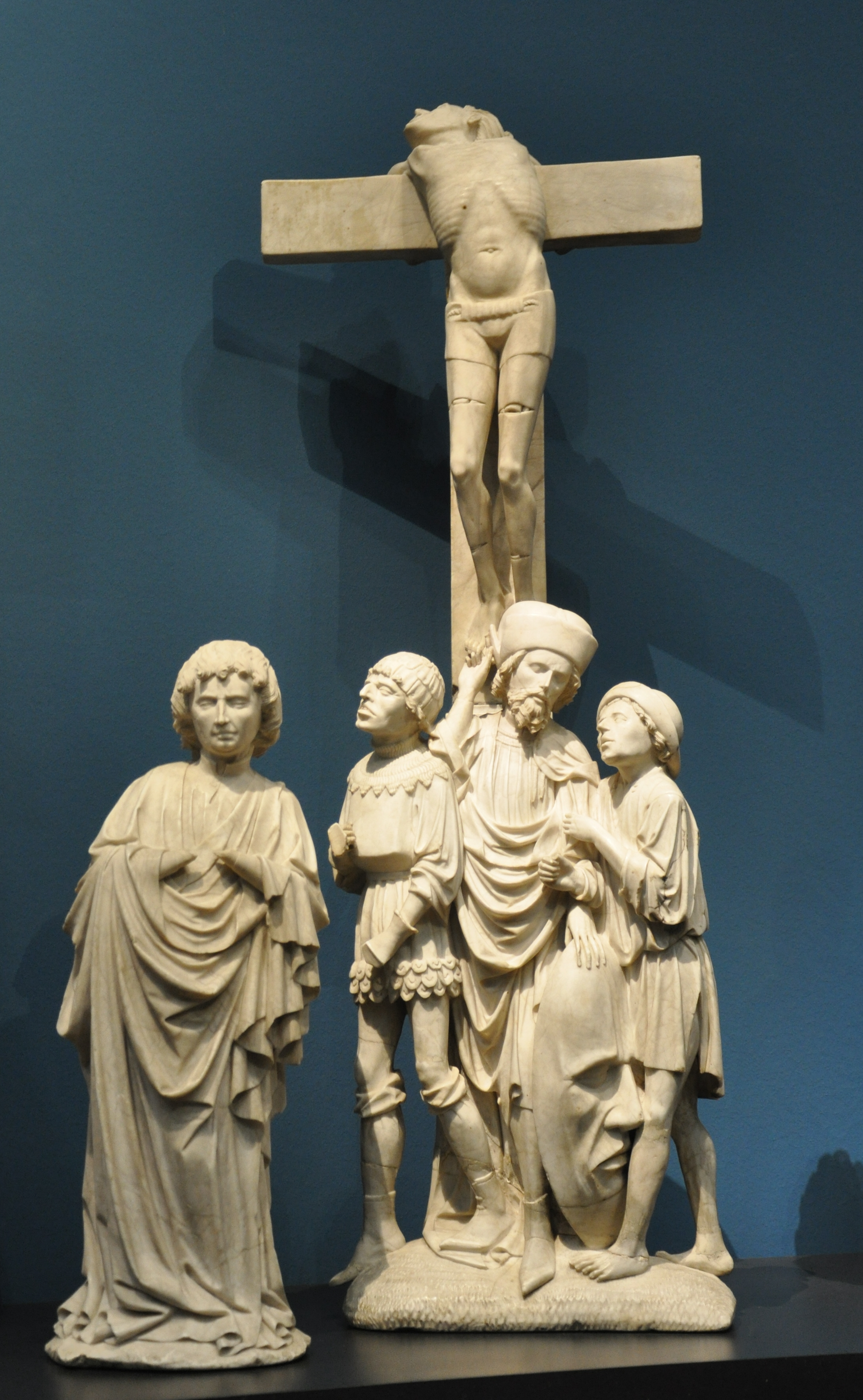 Meister des Rimini-Altars: Kreuzigungsaltar aus Rimini (Rimini-Altar); Südniederlande oder Nordfrankreich, um 1430; Alabaster, geringe Reste alter Fassung Liebieghaus, Frankfurt am Main, Inv. Nr. 400–418; Weblink